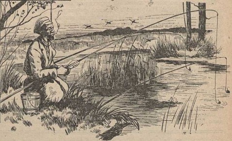 Ілюстрацыя Г. Змудзінскага да апавядання М. Цэлеша "Людзі, зверы, птахі", надрукаванага ў часопісе "Паляўнічы Беларусі", № 3 за 1930